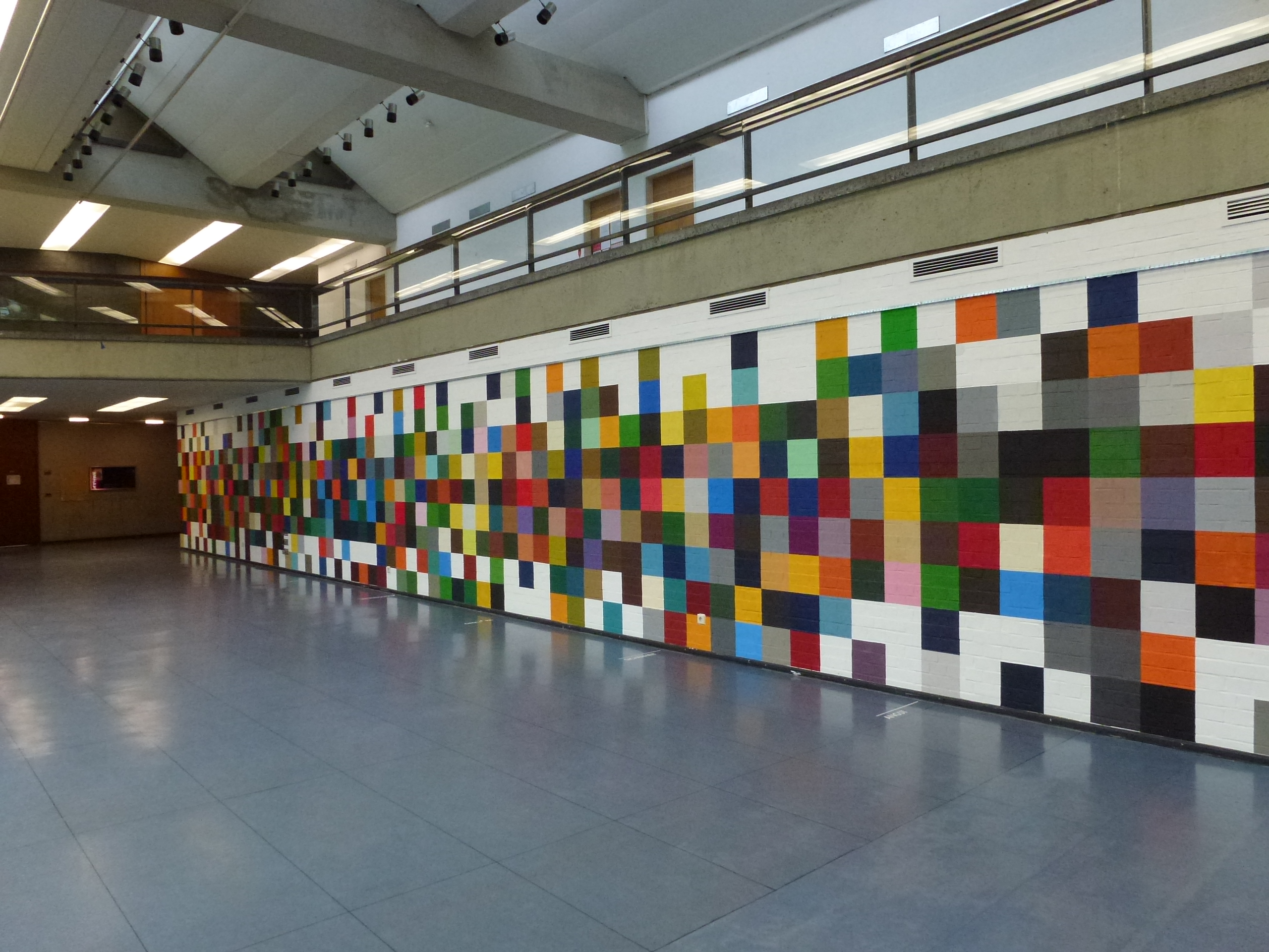 TU Berlin Architekturgebäude